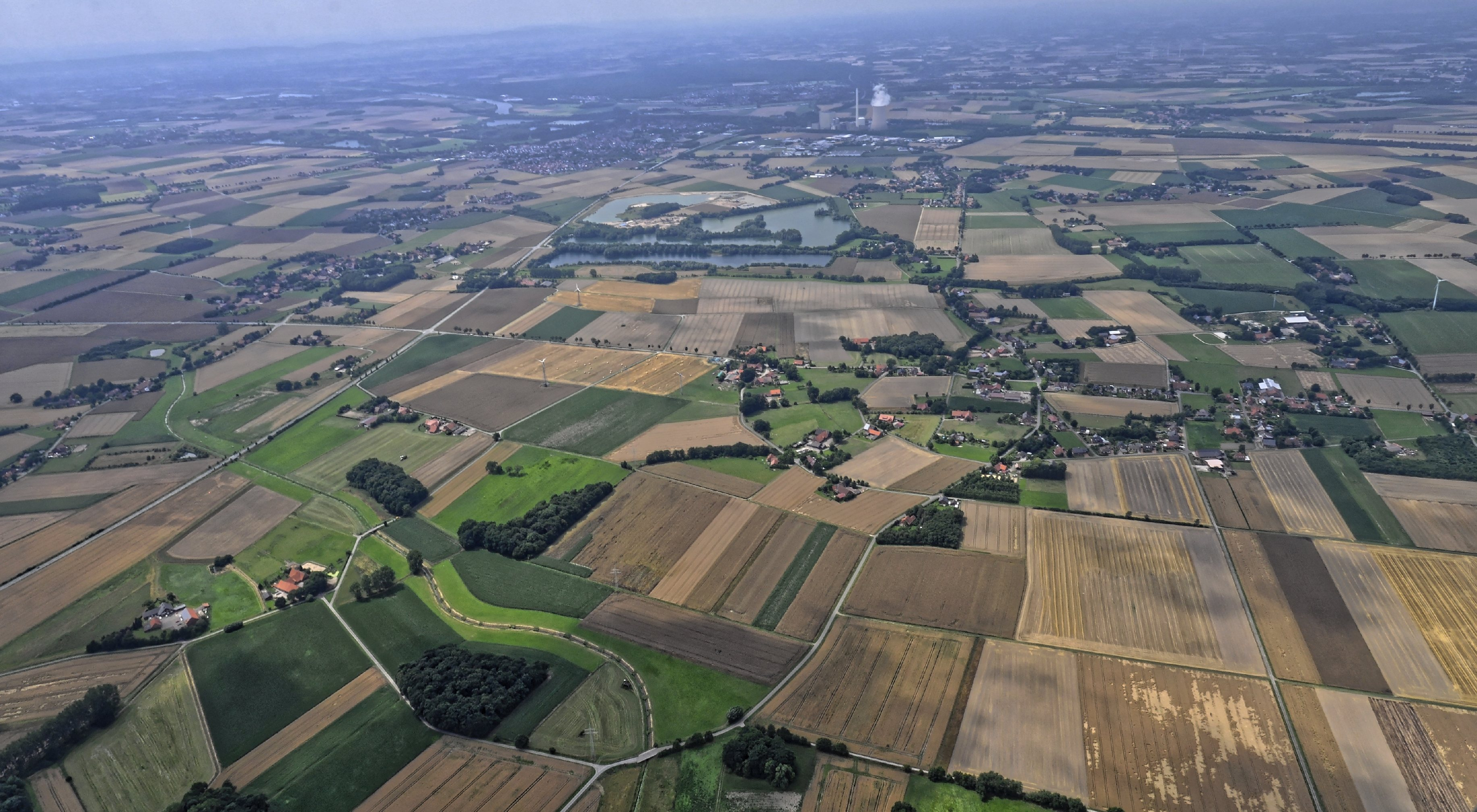 Bilder vom Flug Nordholz-Hammelburg 2015: Blick von Osten auf die großen Kiesteiche an der Riehe; im Hintergrund das Kohlekraftwerk Heyden bei Petershagen-Lahde.